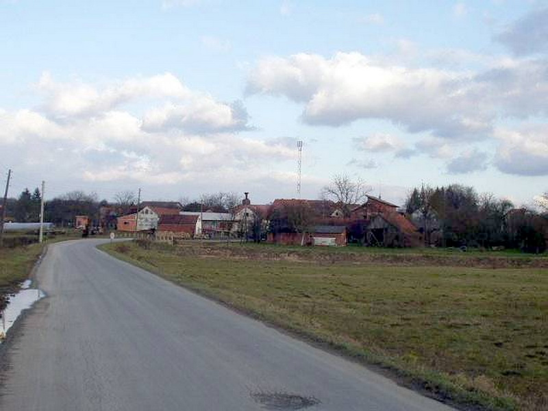 Farkaševac - Entrance